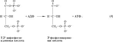 1,3 дифосфоглицериновая кислота превращается в 3-фосфоглицериновую